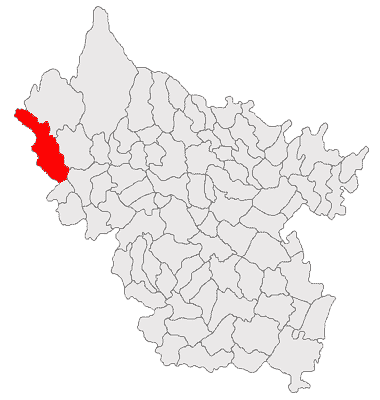 Categorie:Hărţi ale judeţului Buzău